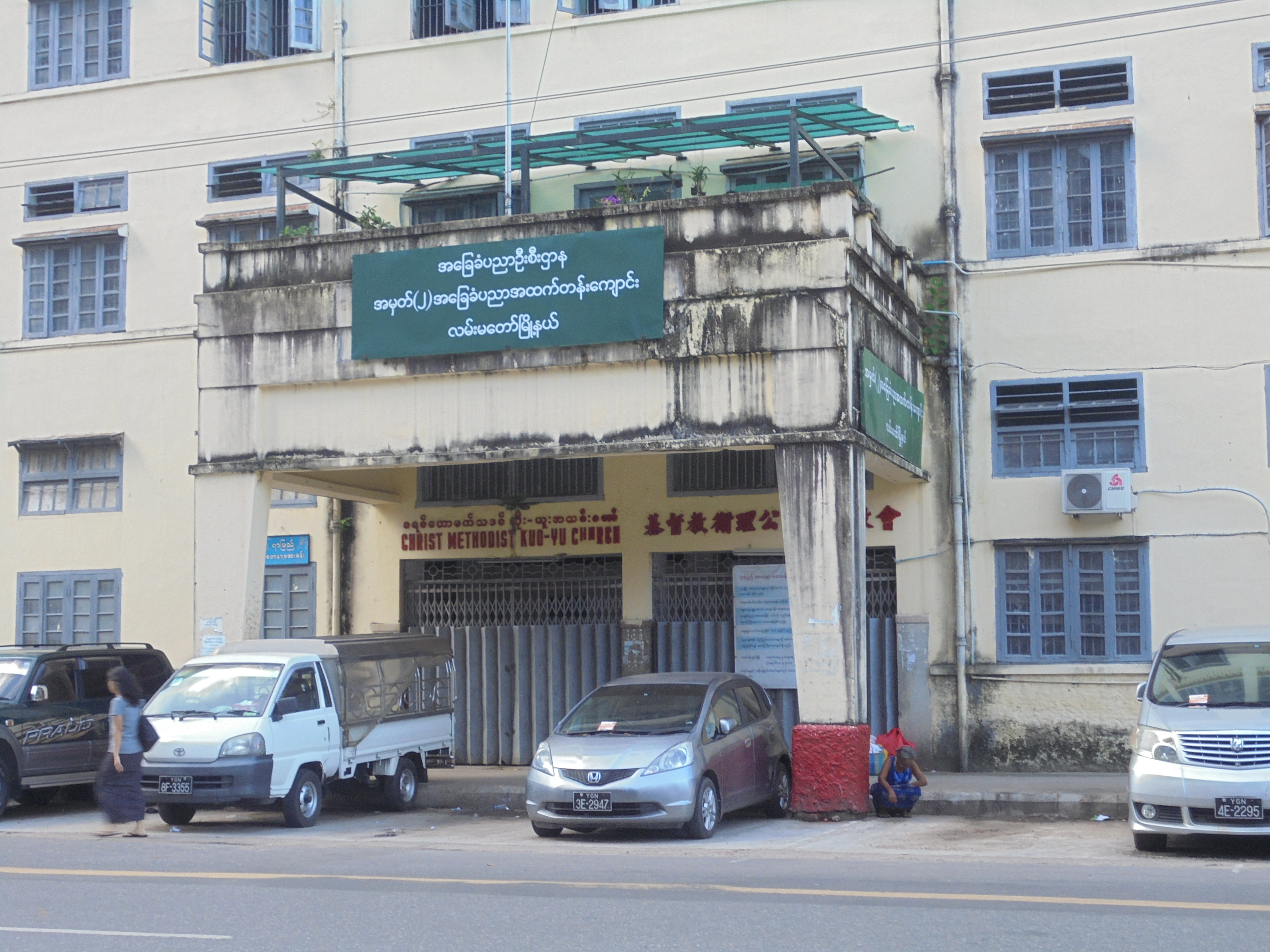 မြန်မာဘာသာ: အ.ထ.က(၂)လမ်းမတော်